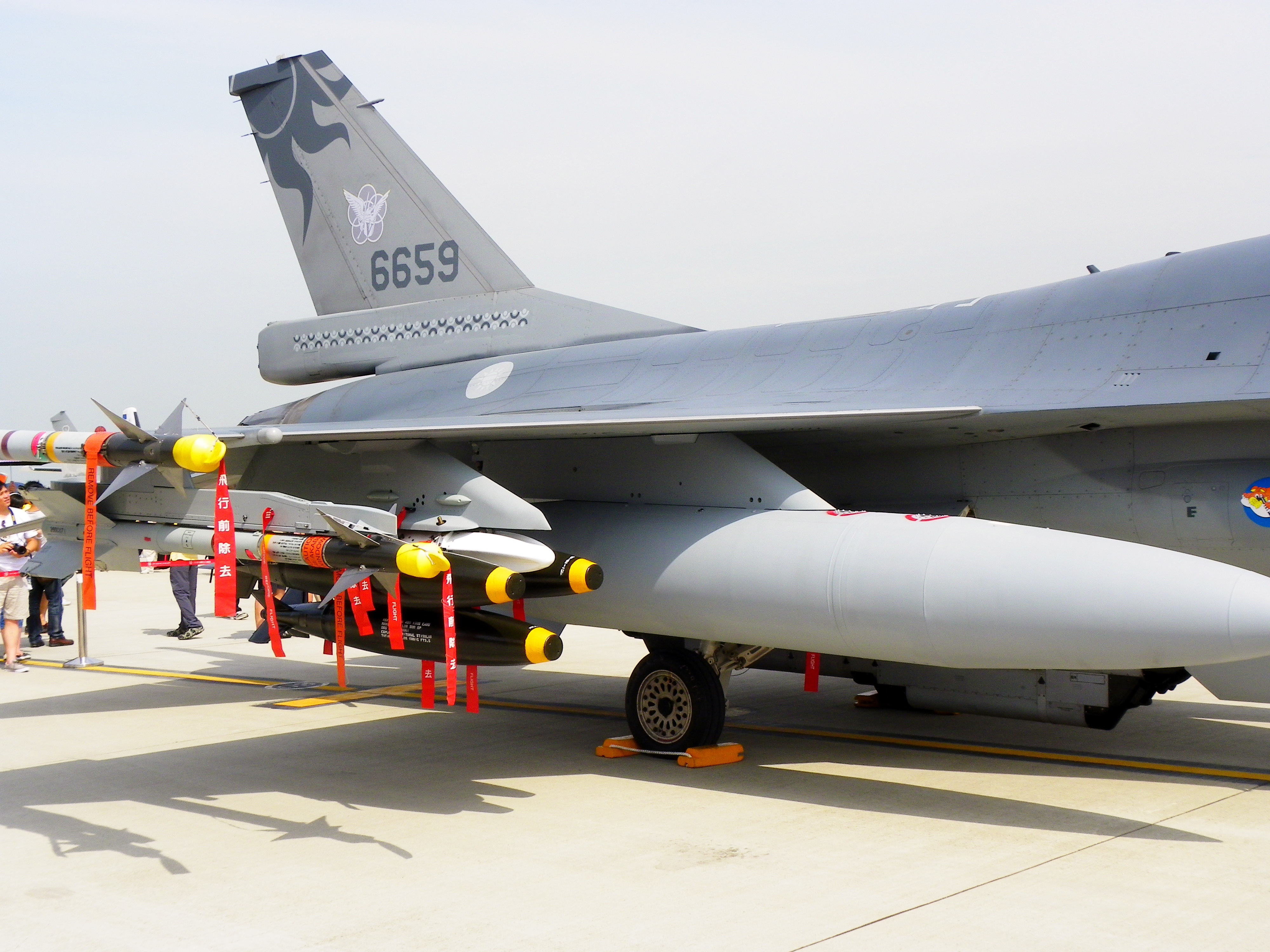 2011年8月13日空軍松山基地公開活動中展示的F-16戰鬥機尾部與主翼下武裝，留意垂直尾翼上方的黑色阿美族馬拉道太陽神圖騰與底部的百步蛇紋圖樣。